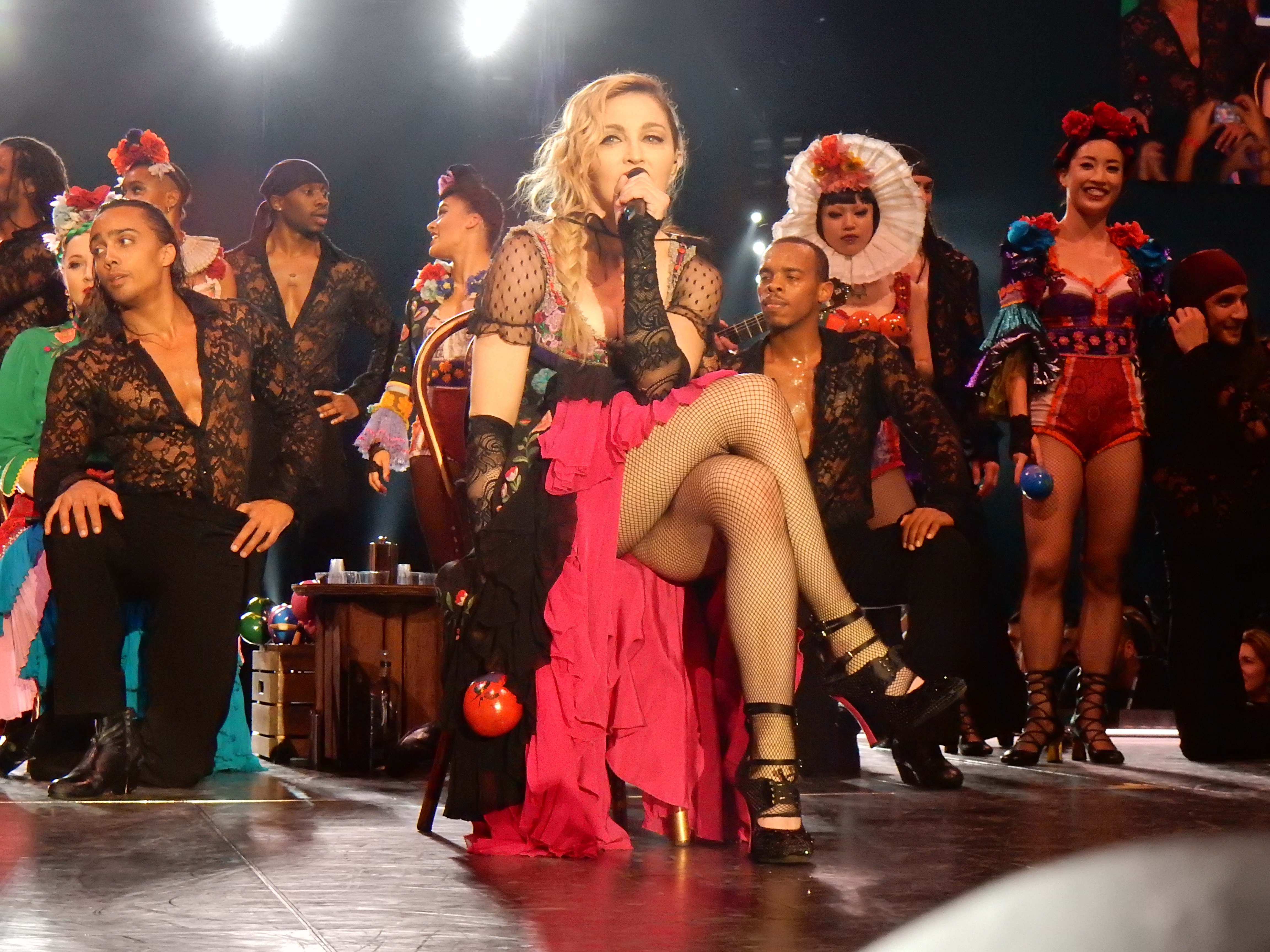 Madonna Rebel Heart Tour 2015 - Stockholm